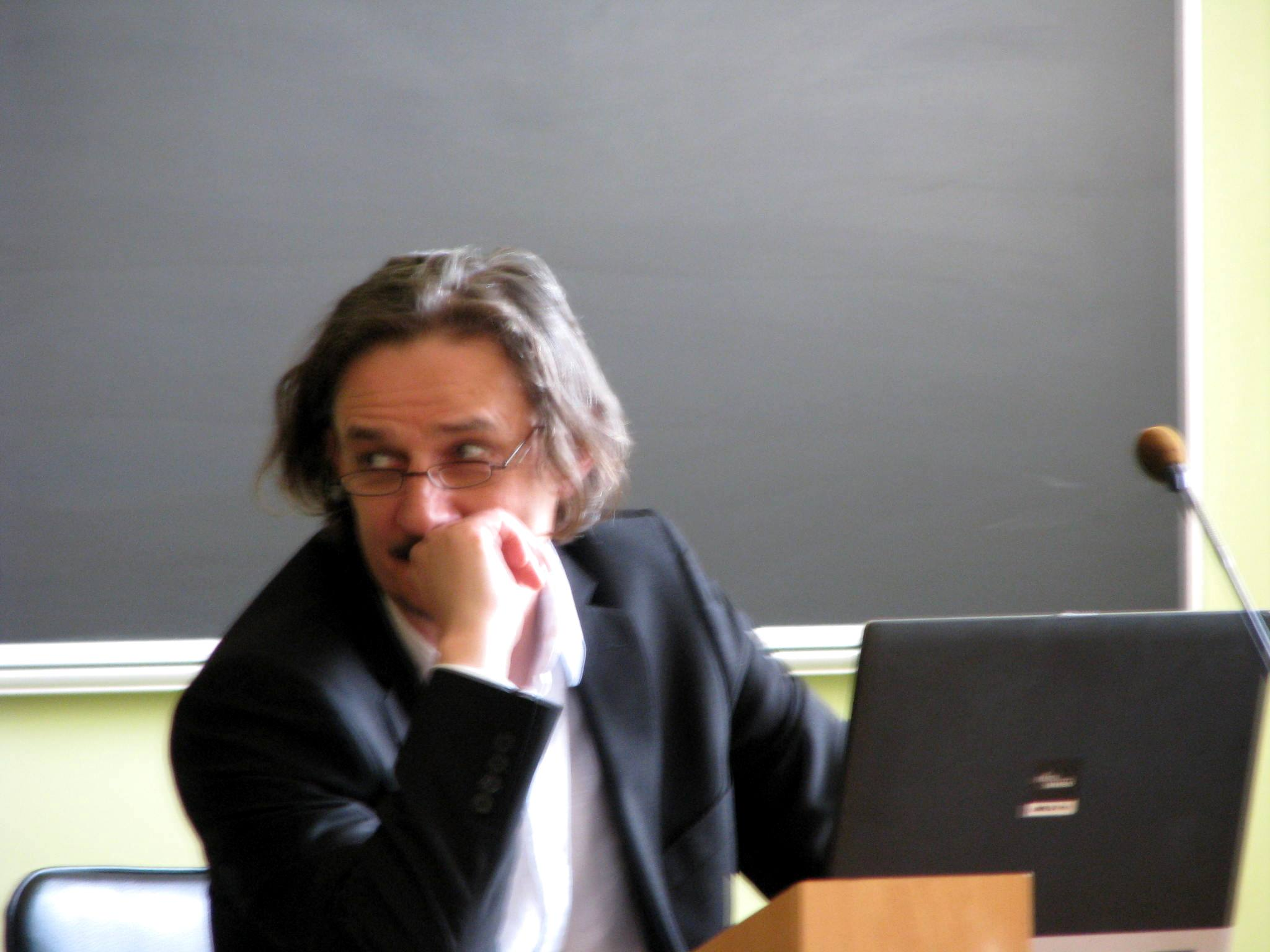 artysta rzeźbiarz Jarosław Perszko